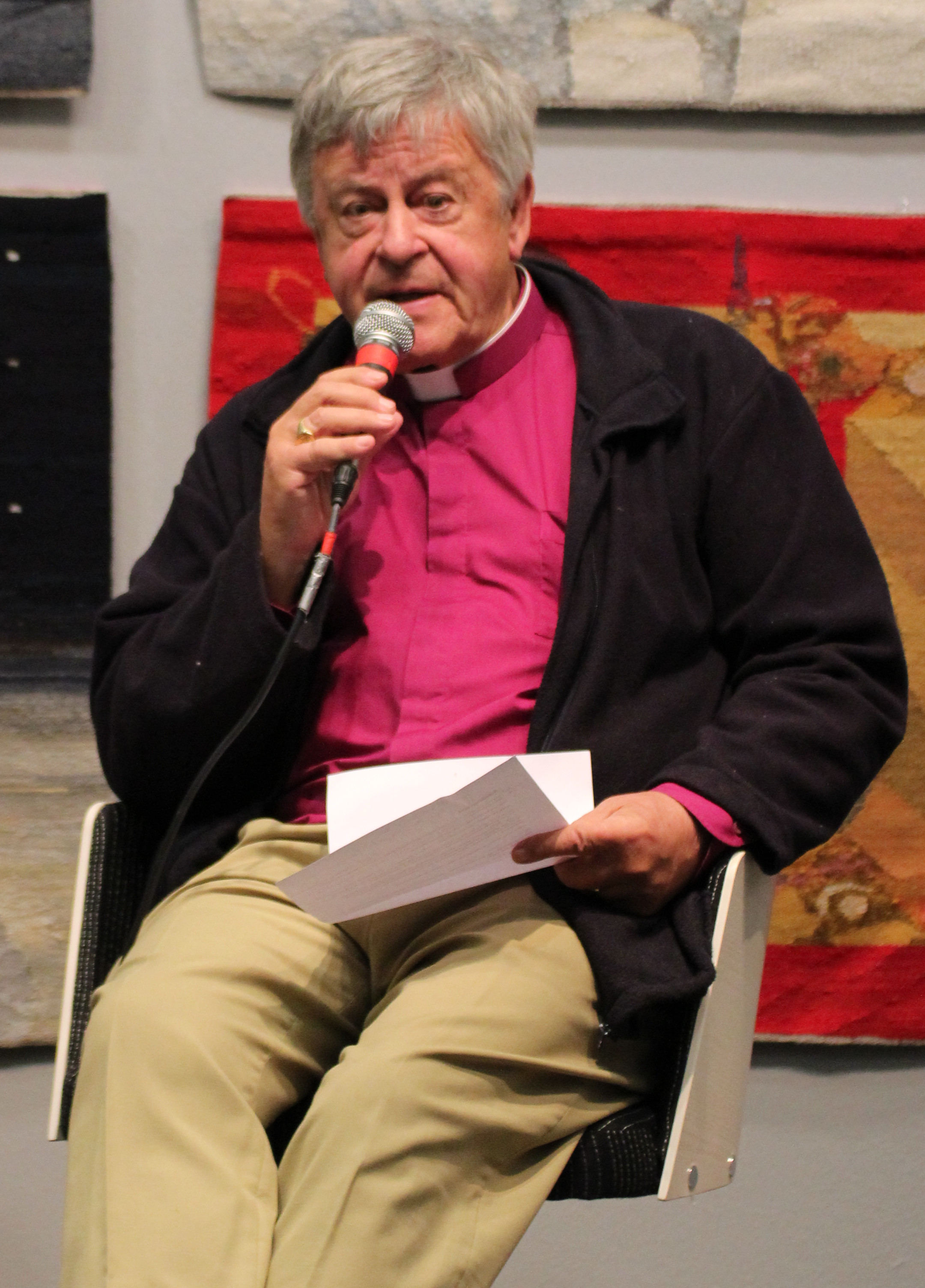 Bengt Wadensjö på Bok- och biblioteksmässan i Göteborg 2014